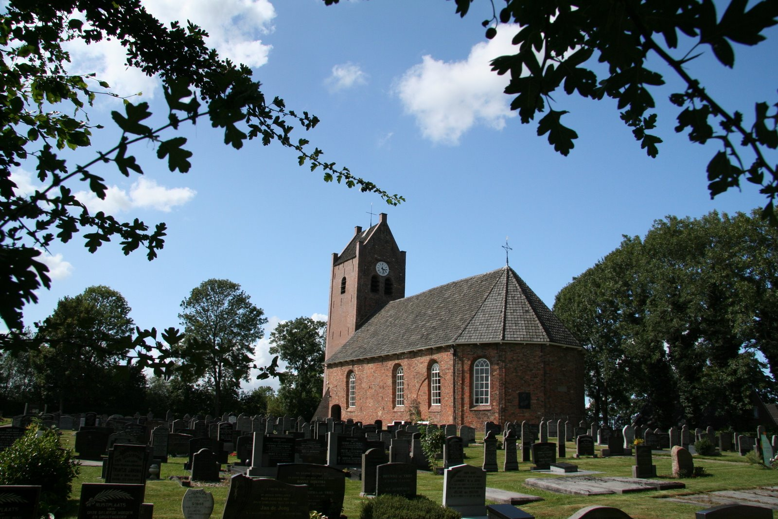 Kerkje Oenkerk